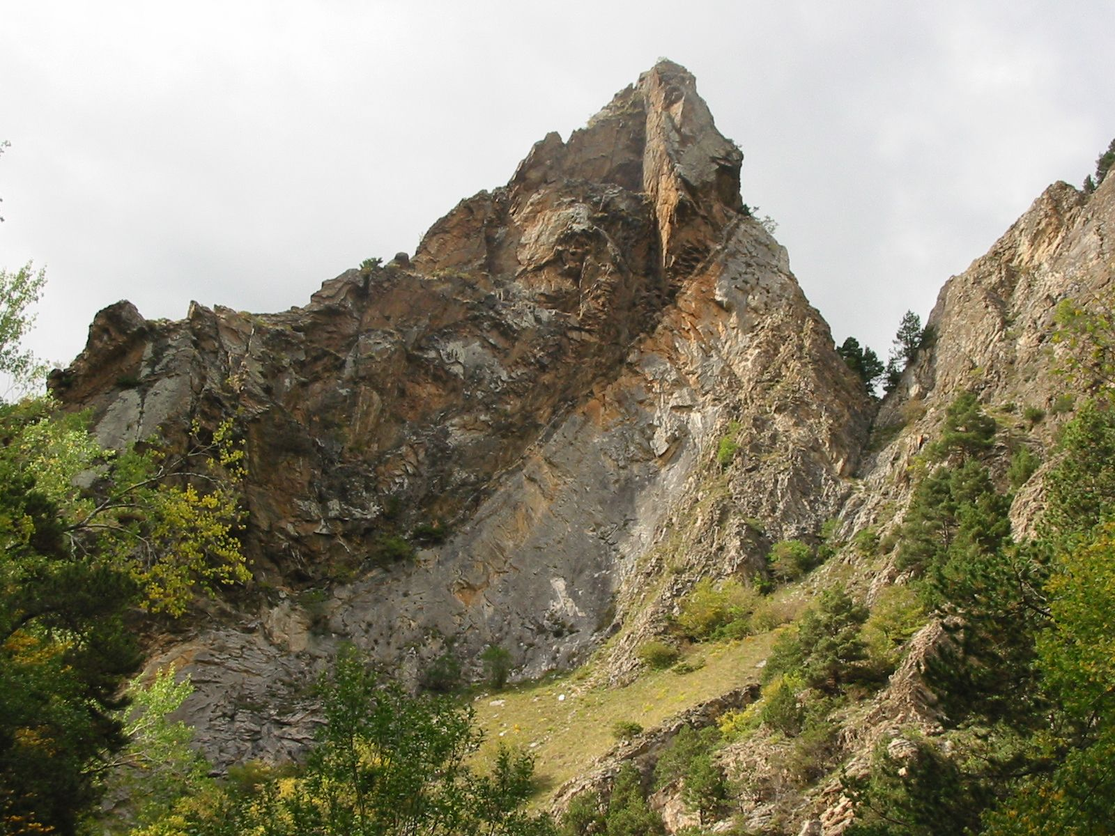 Banc de calcaire dolomitique recouvert de roche métamorphisée, gorges du Sègre, Llo, Pyrénées-Orientales, France